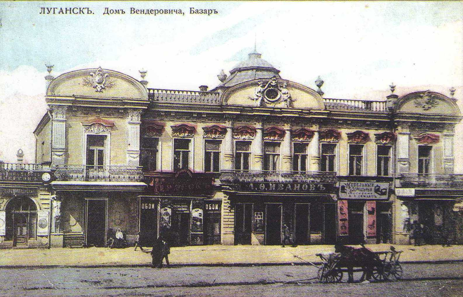 Будинок Вендеровича, вул. Поштова. Луганськ